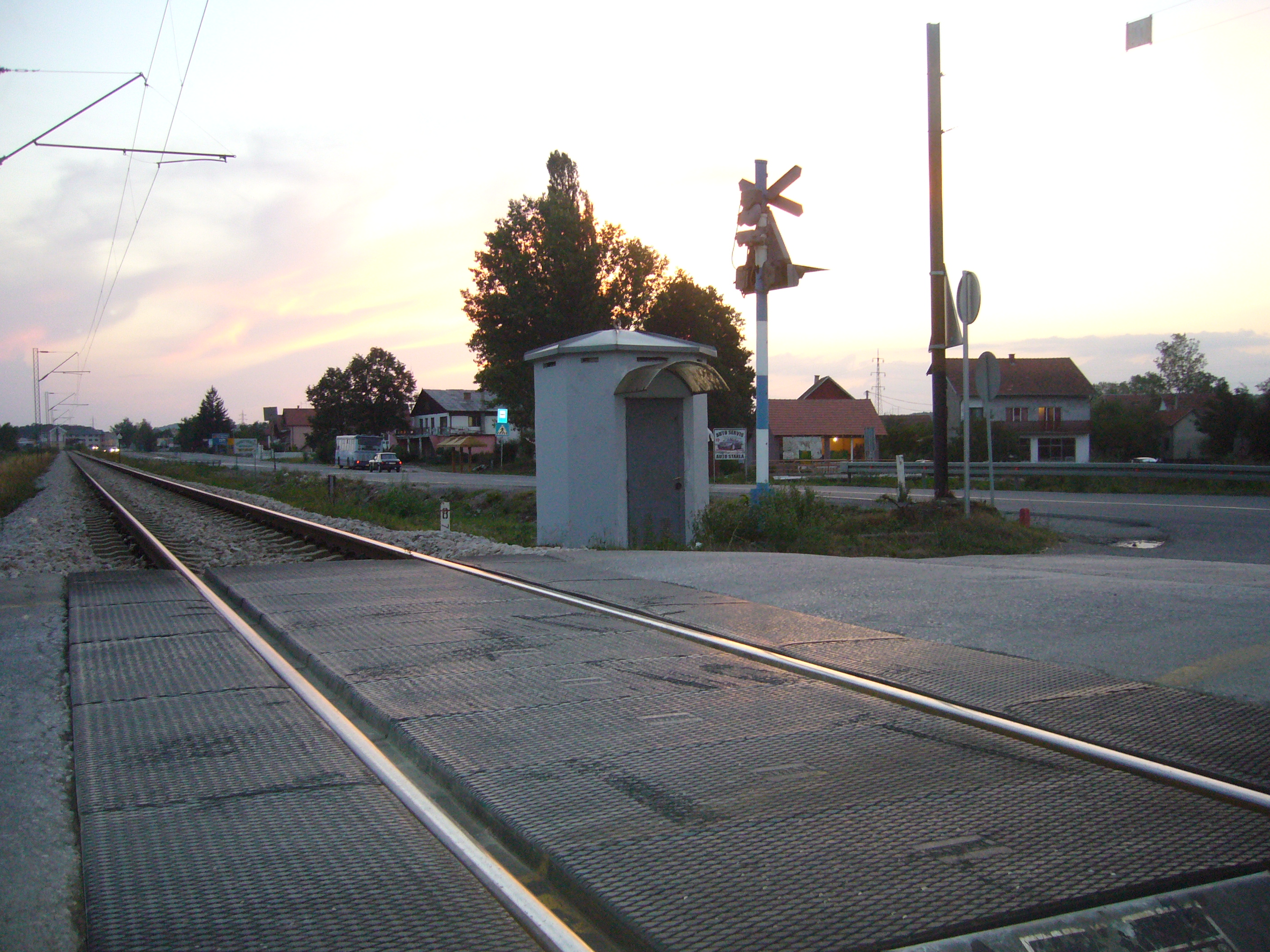 Pruga Beograd-Bar u Popučkama.